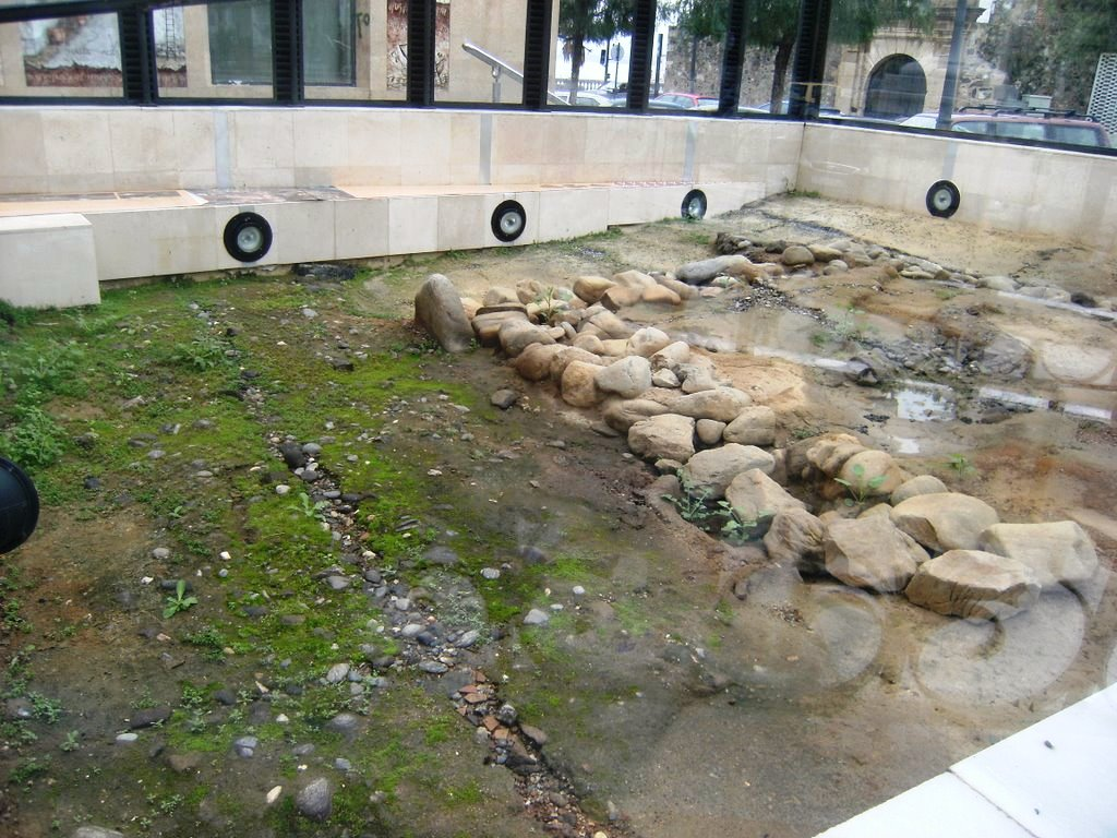 Este yacimiento fenicio ha sido datado mediante el sistema radiocarbónico del siglo VII aC. Las piezas arqueológicas se han hallado junto a la fachada de la Catedral y están consideradas como las más importantes de España, dado a los escasos vestigios que se poseen sobre esta cultura en el país.